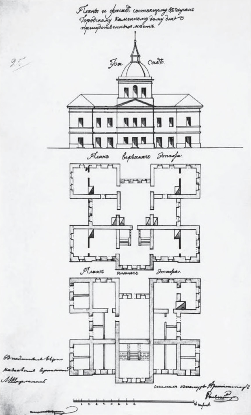 Беларуская (тарашкевіца): Чавусы (Čavusy). Ратуша, абмеры